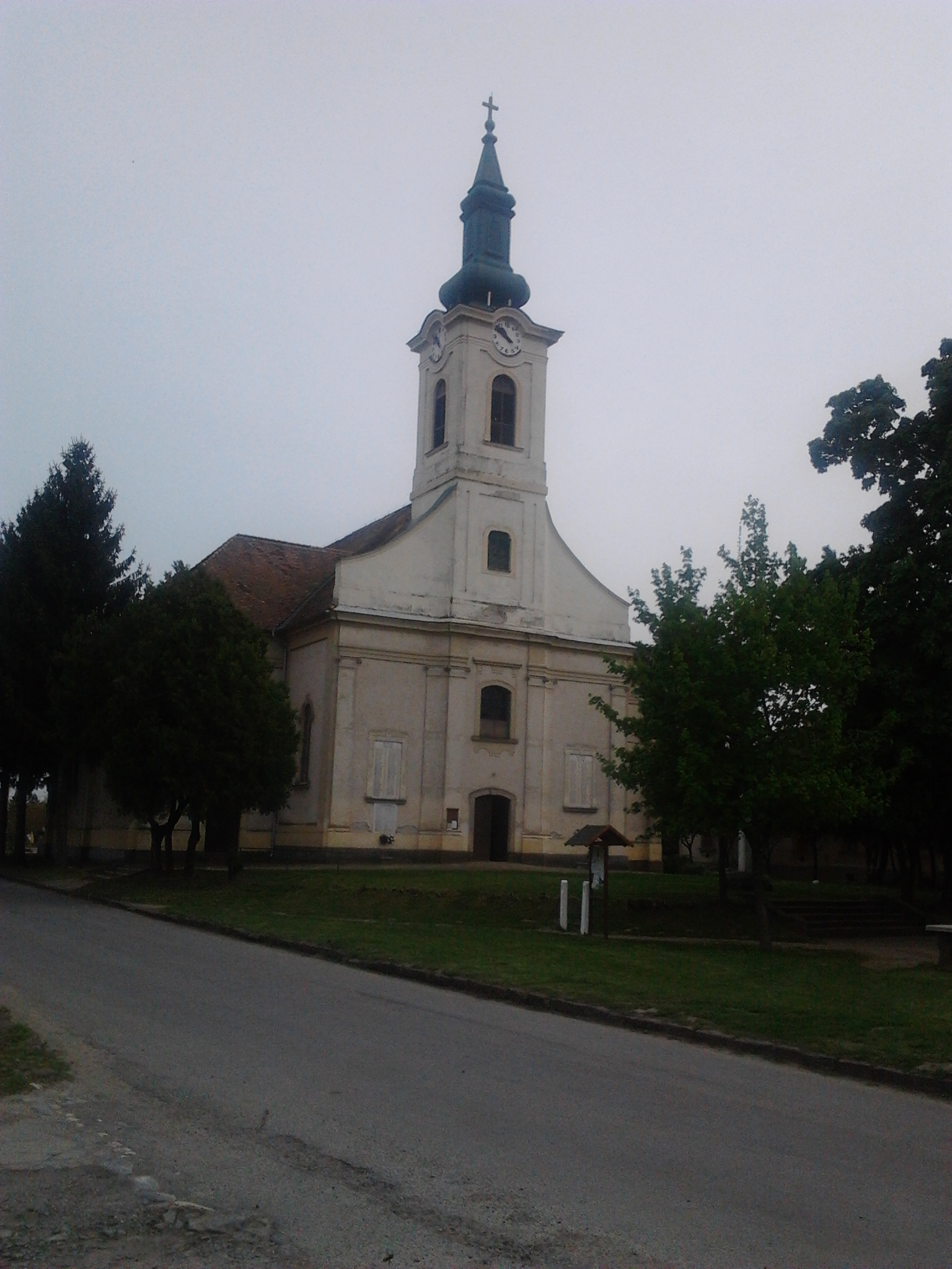 A római katolikus templom épülete Madarason.